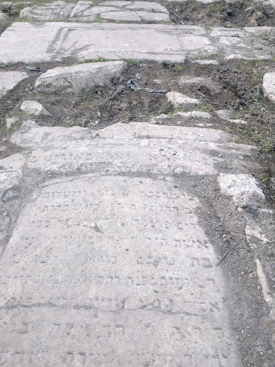 Droga z macew w obozie Liban, scenografia do Listy Schindlera